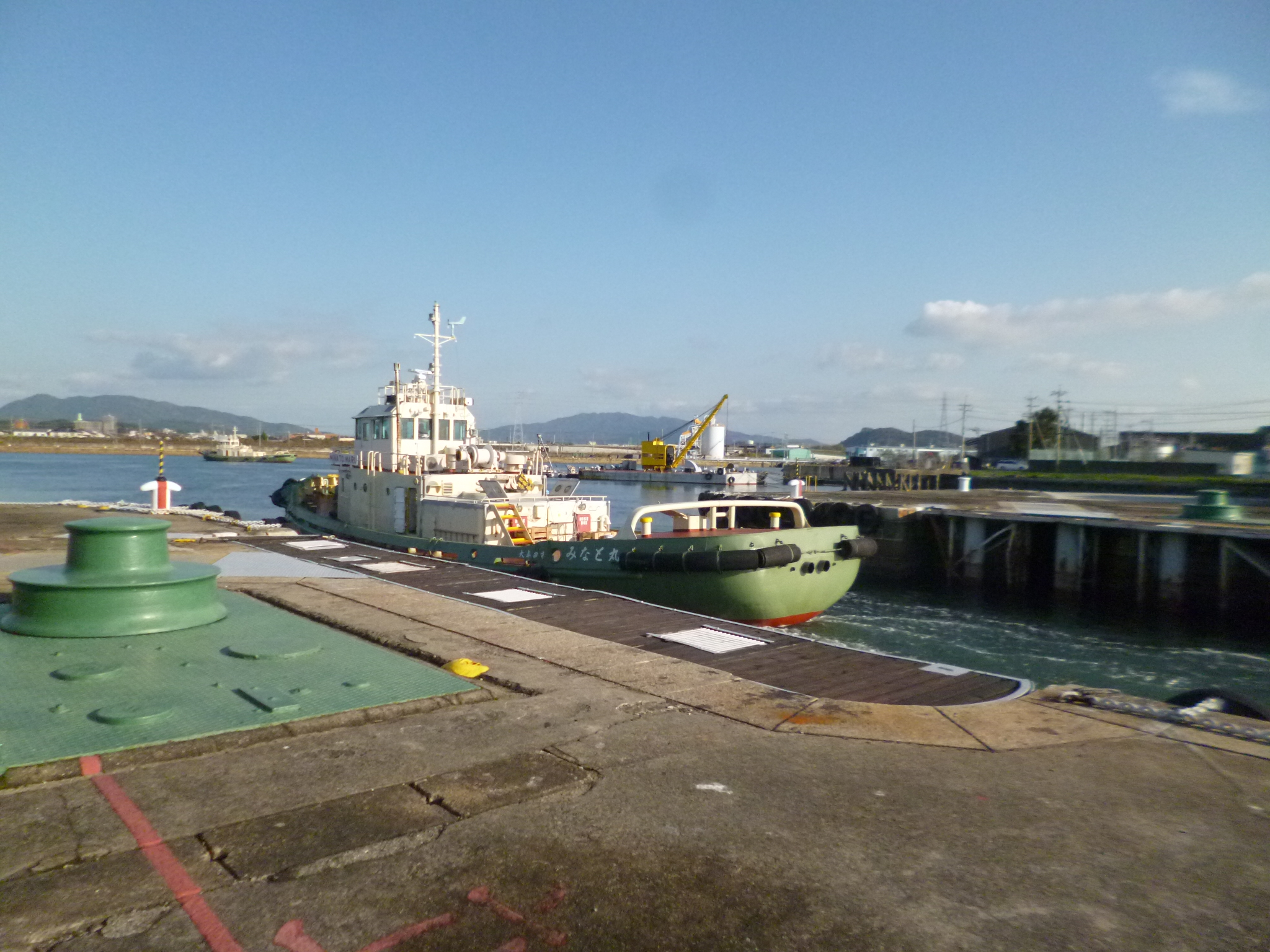 三池港の閘門が開いている時にそこを通過するタグボートです。